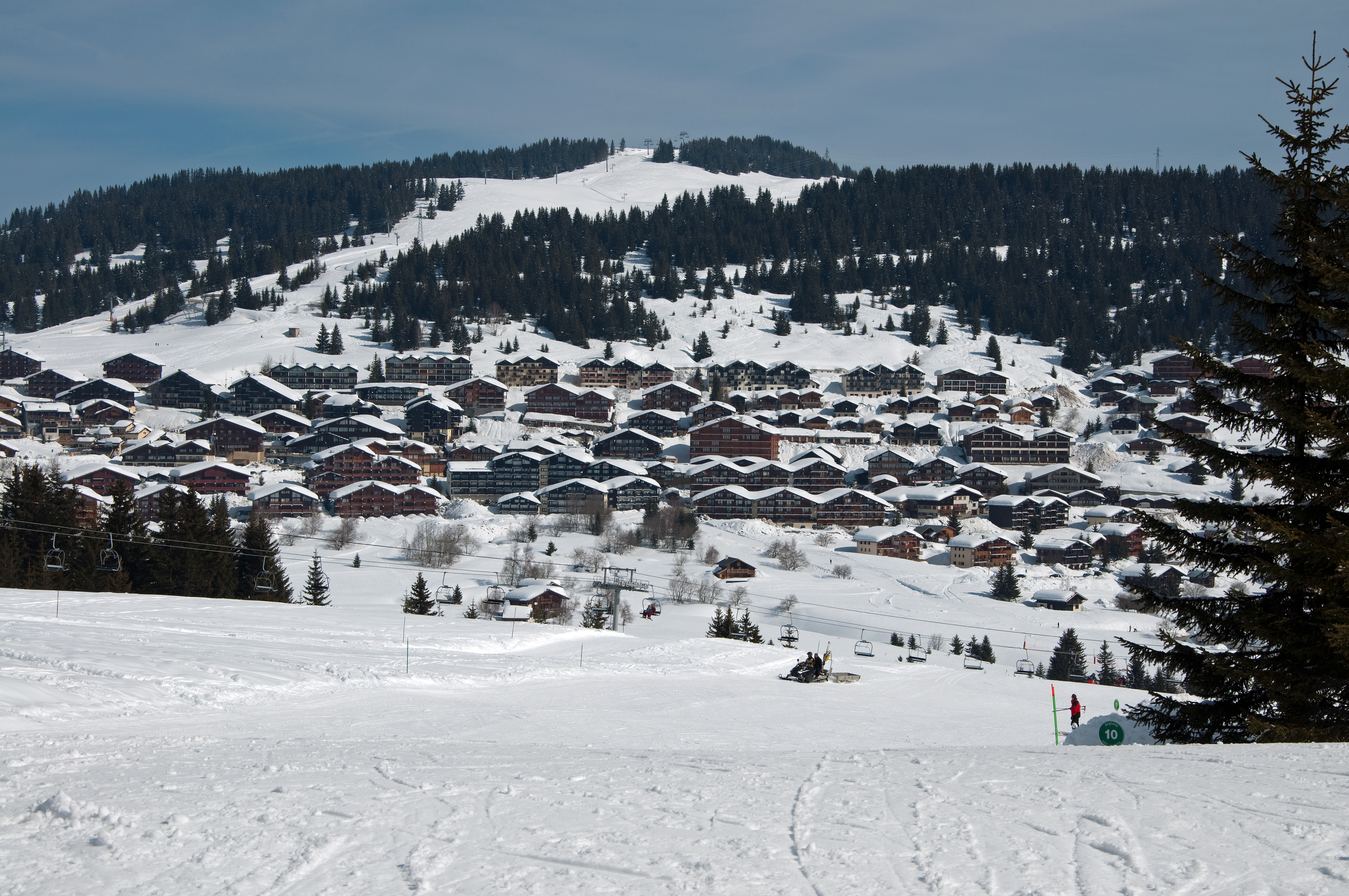 Station de sports d'hiver (1650m) sise à Hauteluce en Savoie (France)